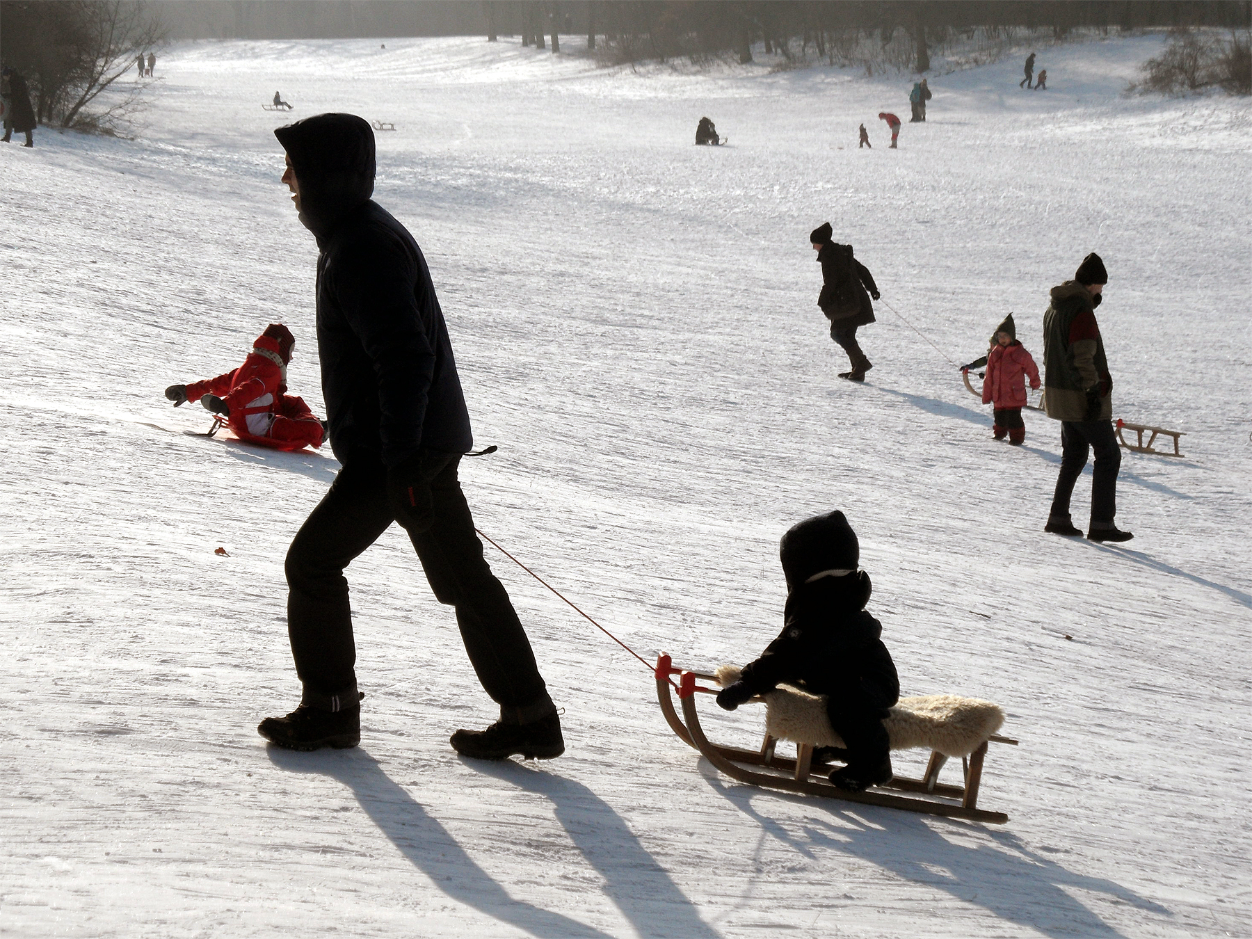 Volkspark Hasenheide im Winter